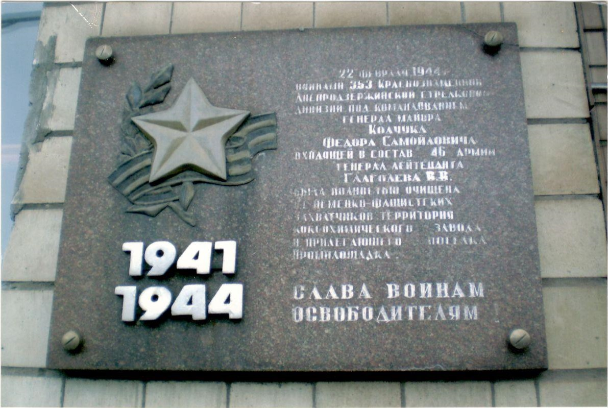 Пам’ятний знак на честь воїнів 353 стрілецької дивізії, яка звільняла місто